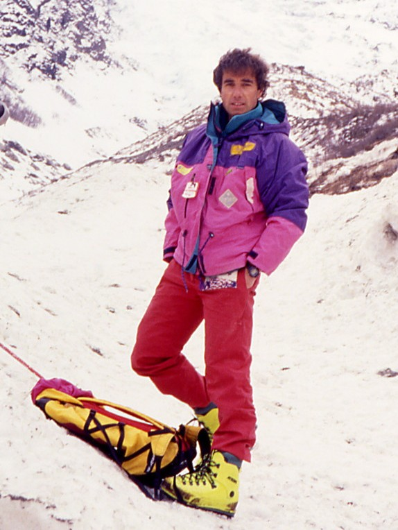 Pierre BEGHIN sur le dépôt de l'avalanche de Taconnaz à Chamonix (Haute-Savoie)